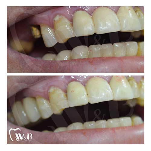 حالة عملية لزراعة الأسنان في عيادة وايت أند برايت بالقاهرة مصر